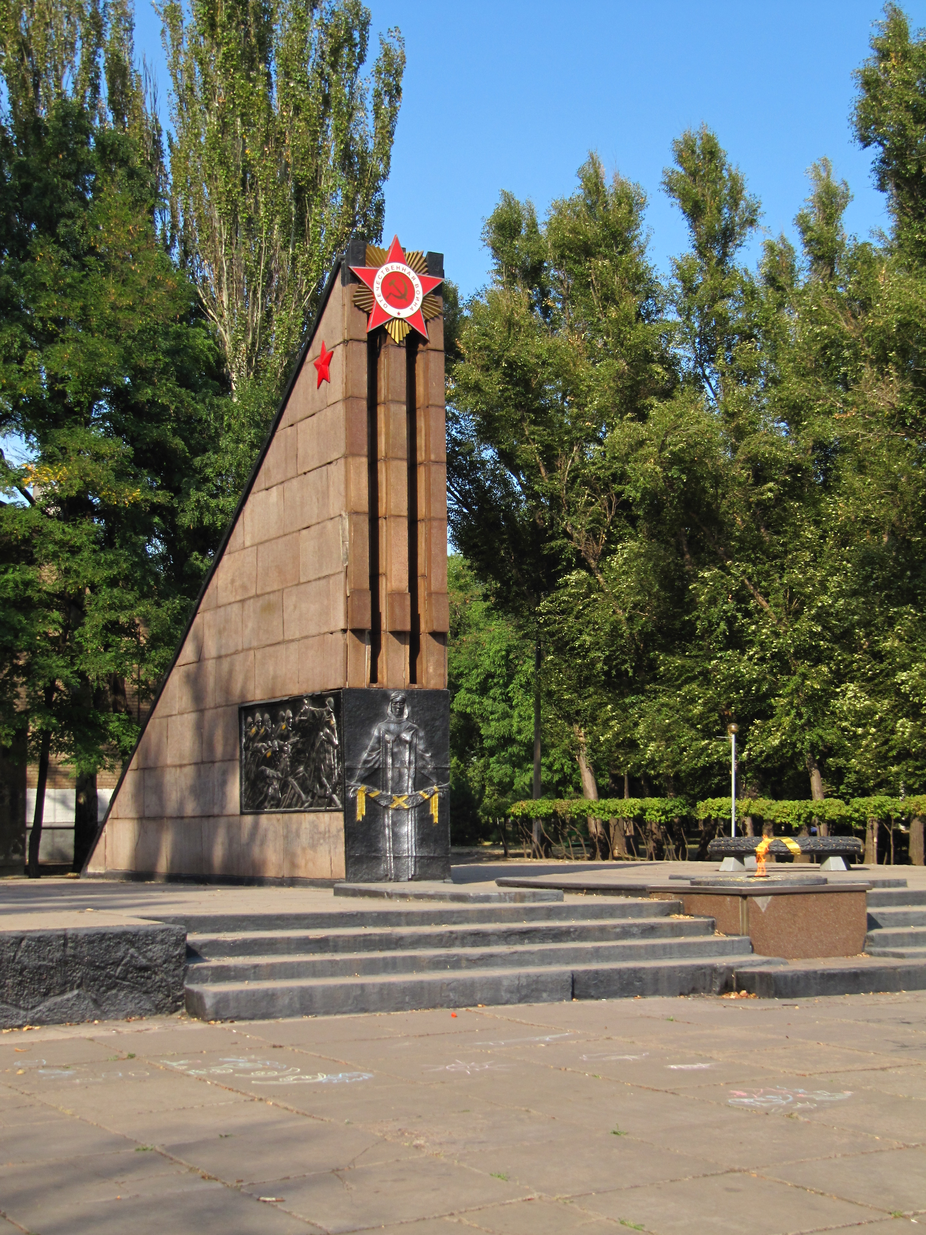 Братська могила радянських воїнів, Кривий Ріг, вул. Постишева / біля к-ру «Космос»/, сквер 60 річчя Перемоги